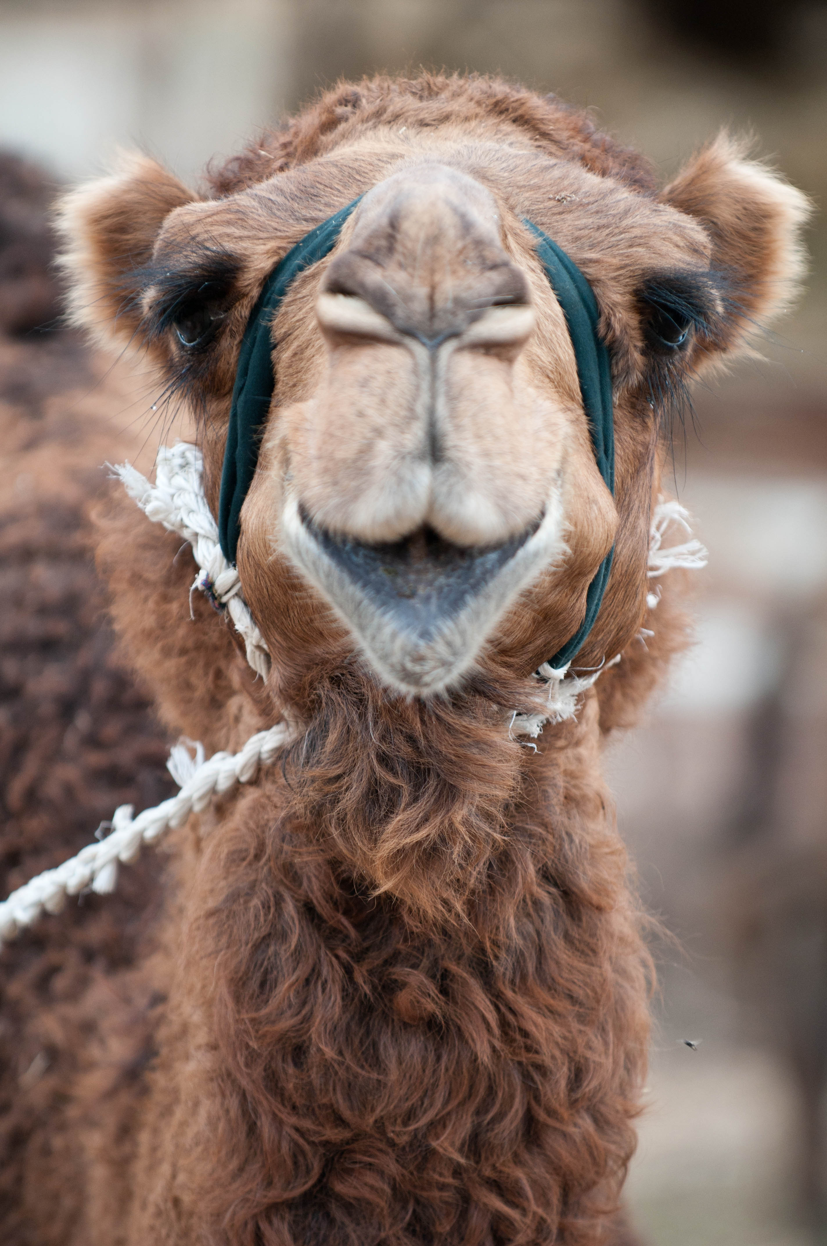 Studfarm in Turkmenistan